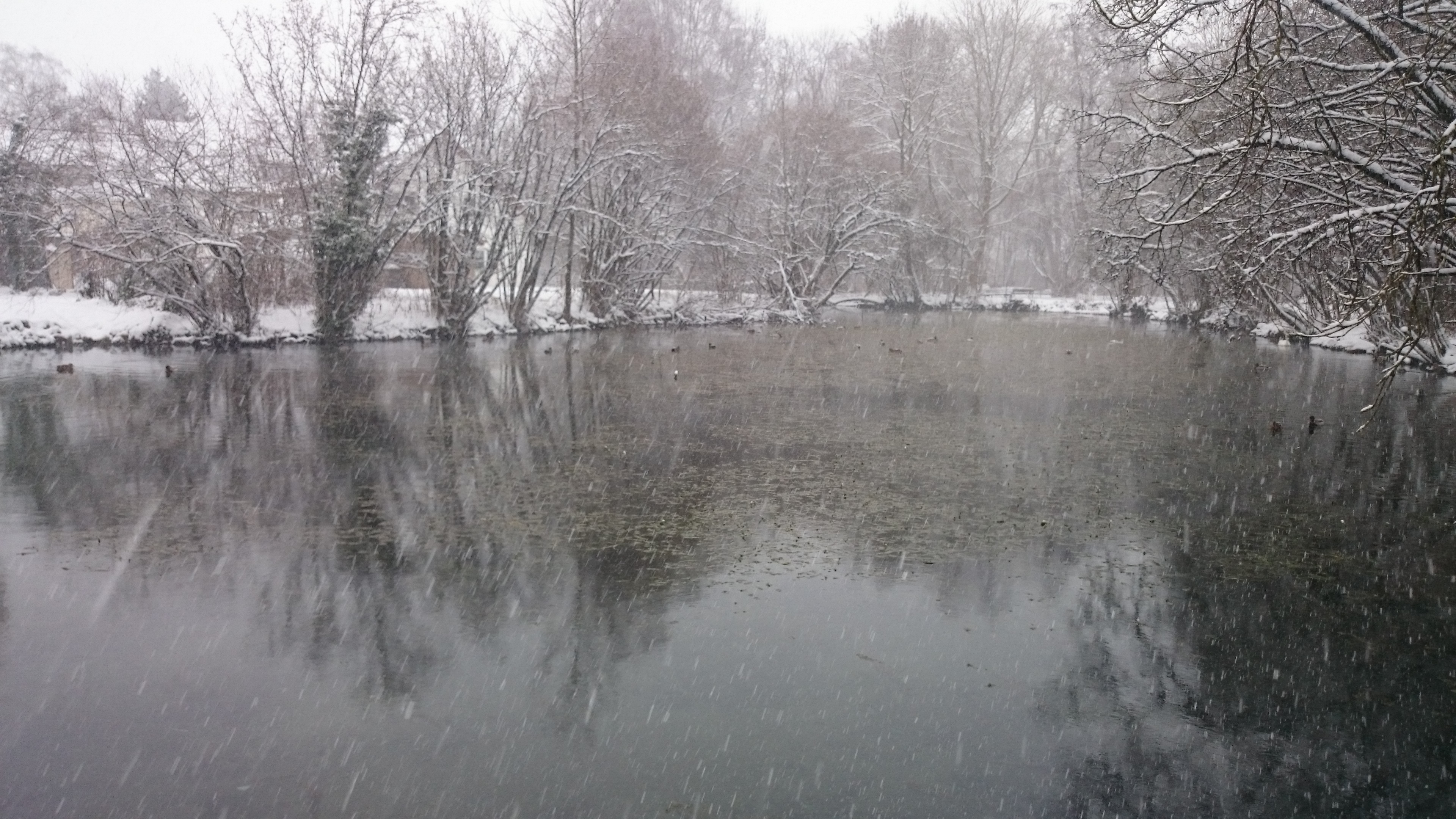 Baders Weiher (Bunzenmüllersweiher) in Langenau, der Ursprung der Kalten Ach